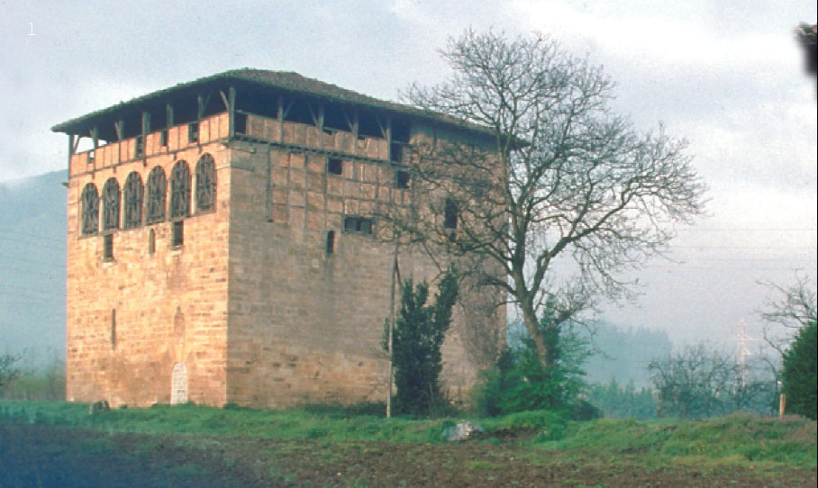 Muntxaraz dorrea Abadiño